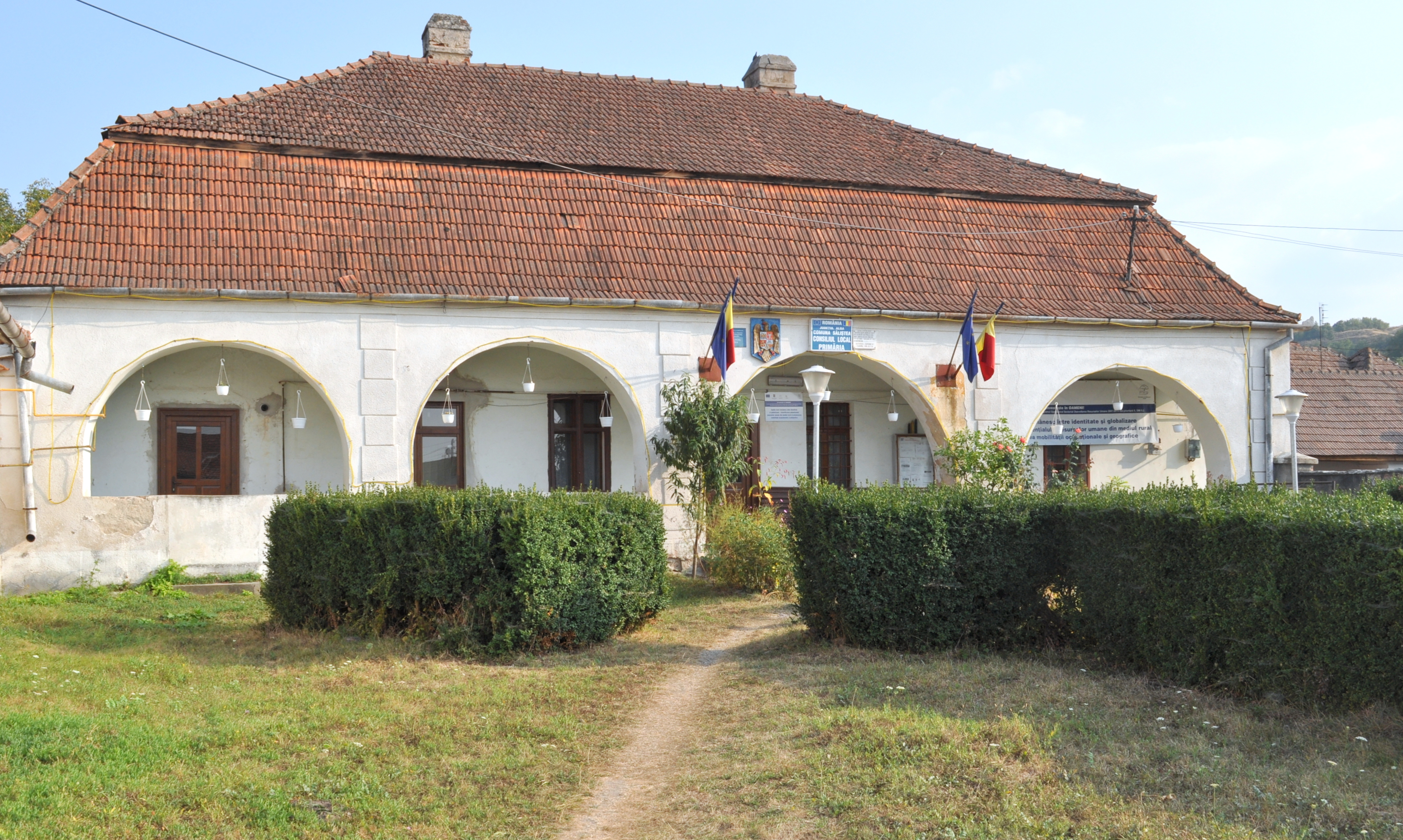 Săliștea, județul Alba